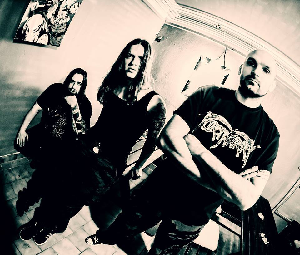 Tortharry band